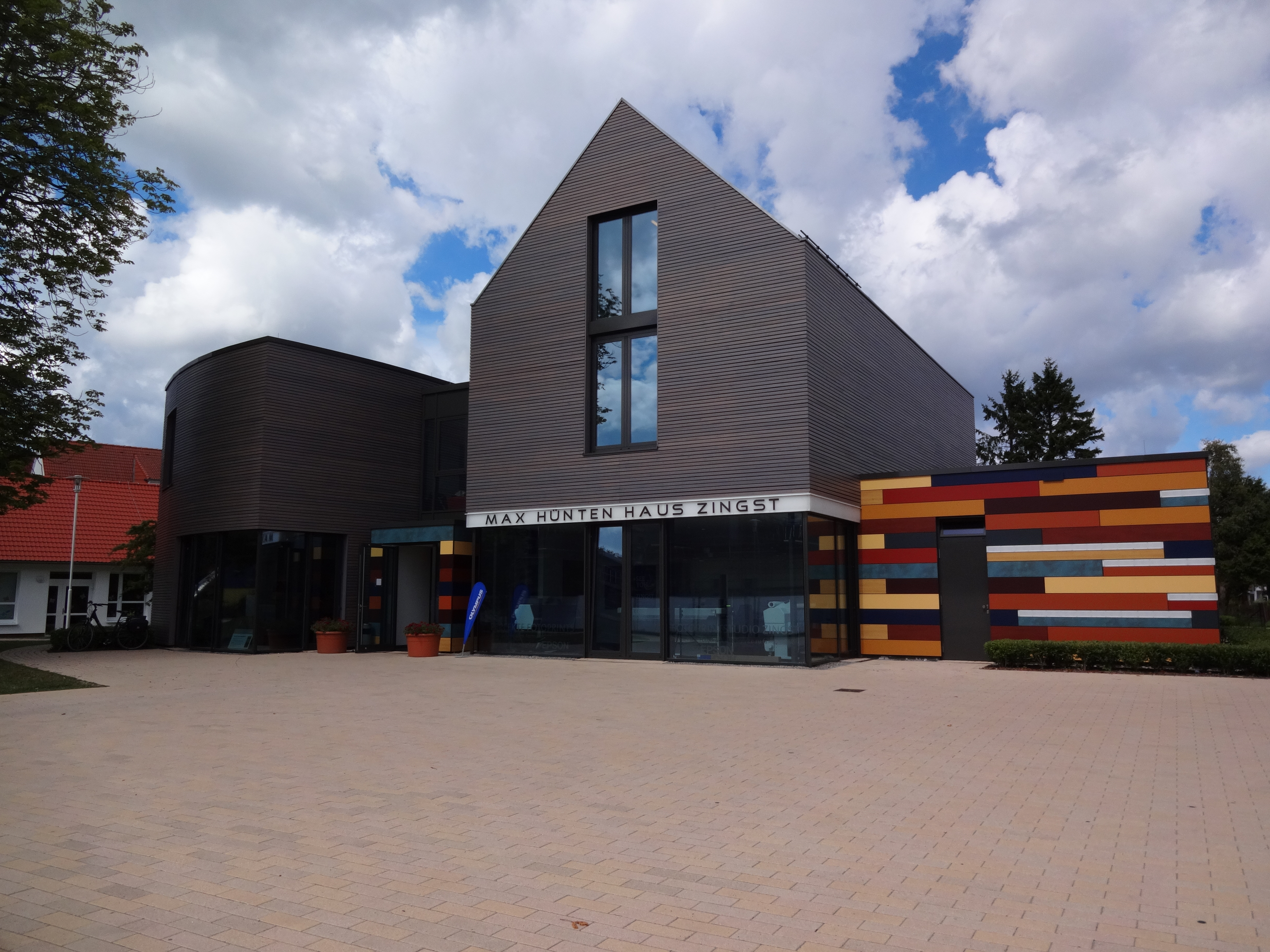 Max-Hünten-Haus in Zingst (Mecklenburg-Vorpommern)